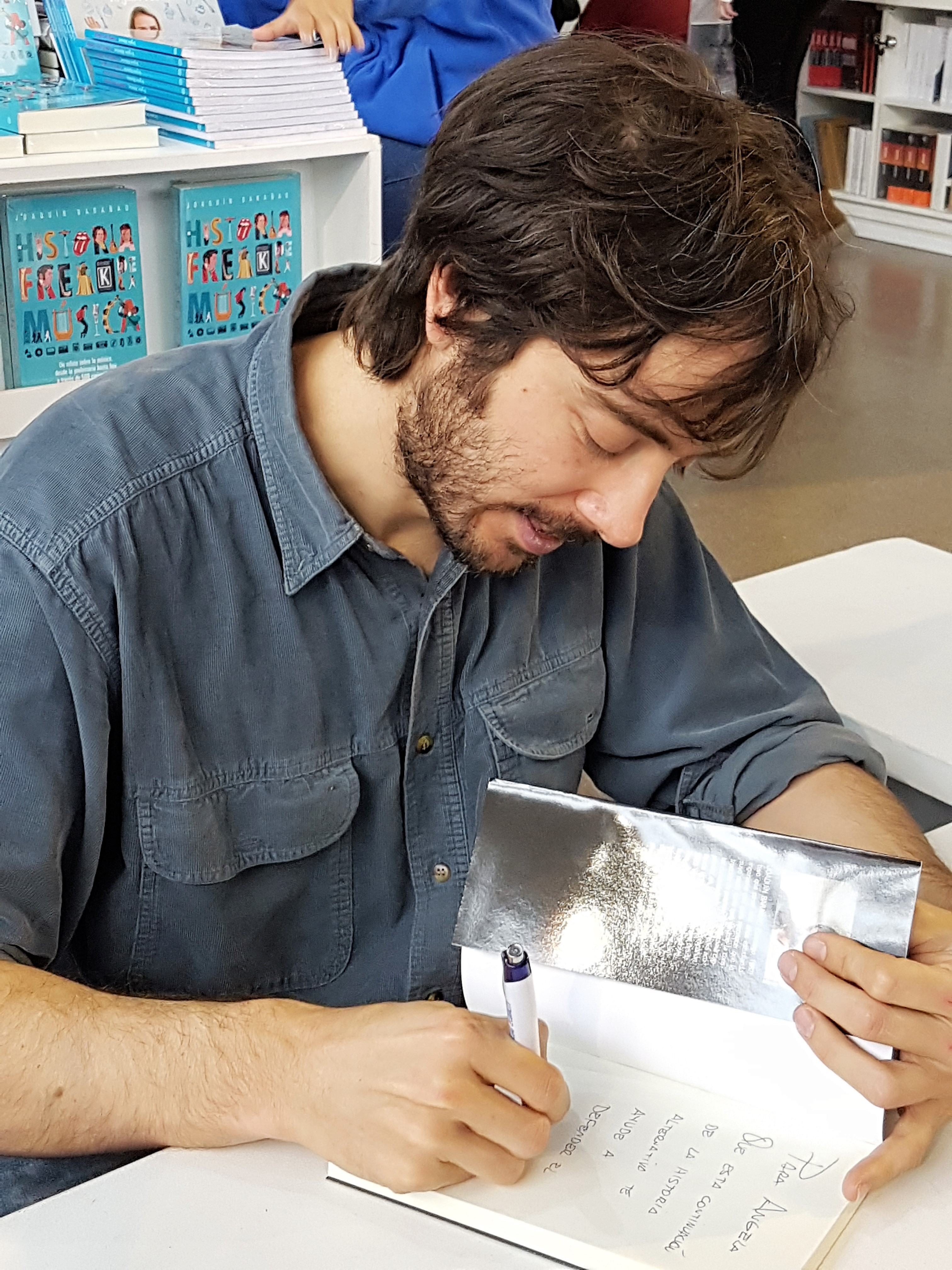 El escritor chileno Joaquín Barañao firma sus obras en el stand de la editorial Planeta en la Feria Internacional del Libro de Santiago 2017